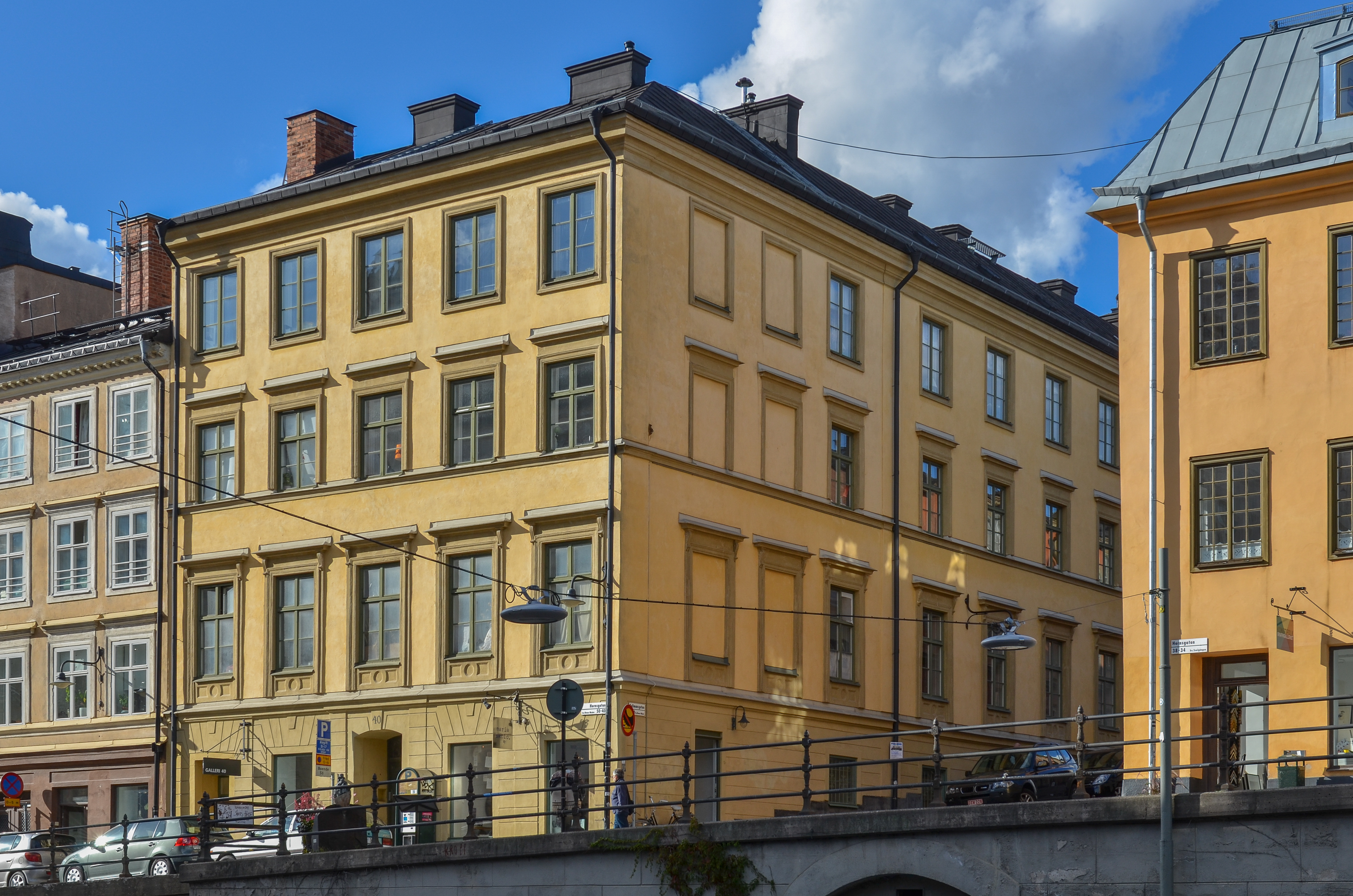 Hornsgatan 40, Södermalm, Stockholm.